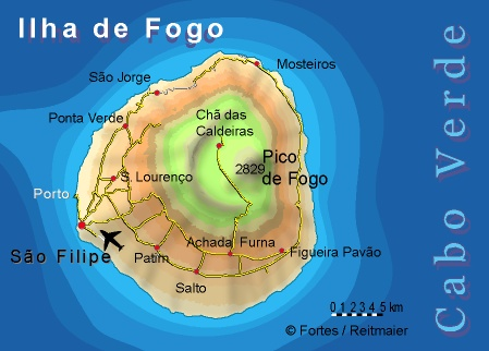 Kartographie: Lucete Fortes / Pitt Reitmaier Design: Pitt Reitmaier Urheber hat diese Grafik persönlich hochgeladen und unter GFDL gestellt.